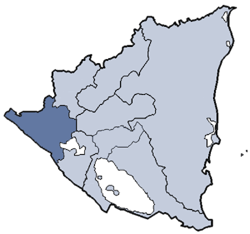 Mappa della diocesi cattolica di Leon, in Nicaragua. Lavoro personale eseguito a partire da questa immagine di Commons. Fonte per i confini delle diocesi: Categoria:Chiesa cattolica in Nicaragua